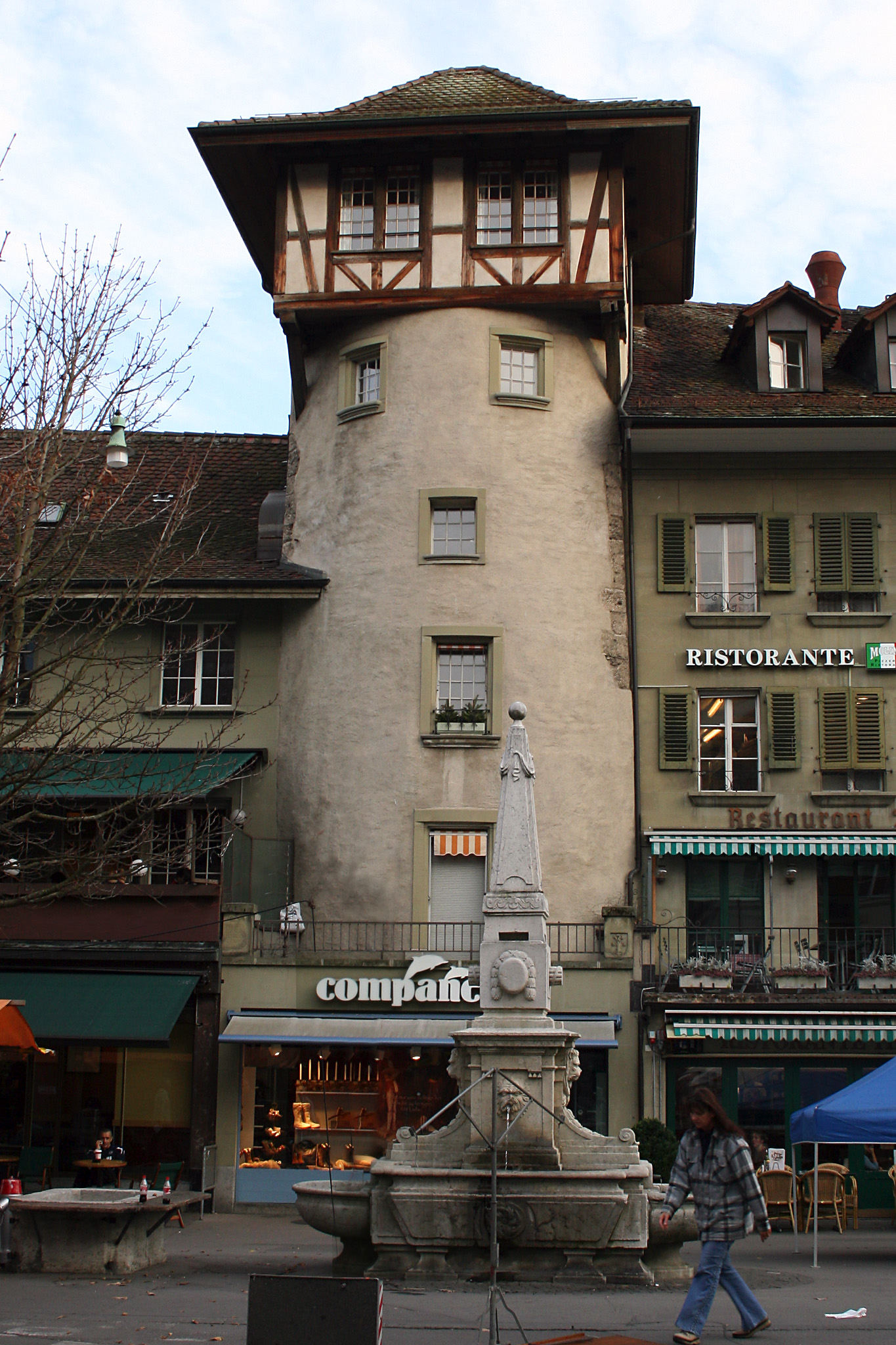 Holländerturm, Berne, Switzerland